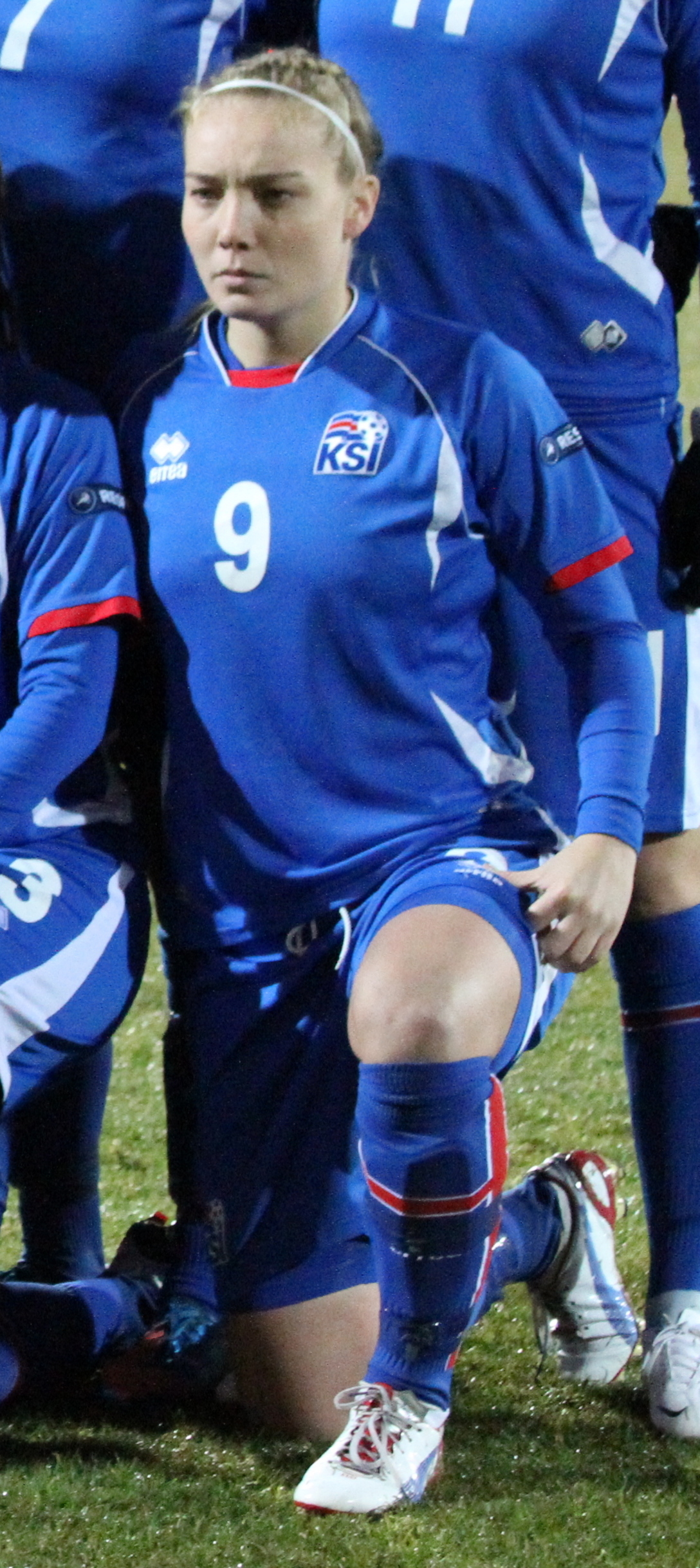 Margrét Lára Viðarsdóttir before Iceland-Ukraine 25/10/2012